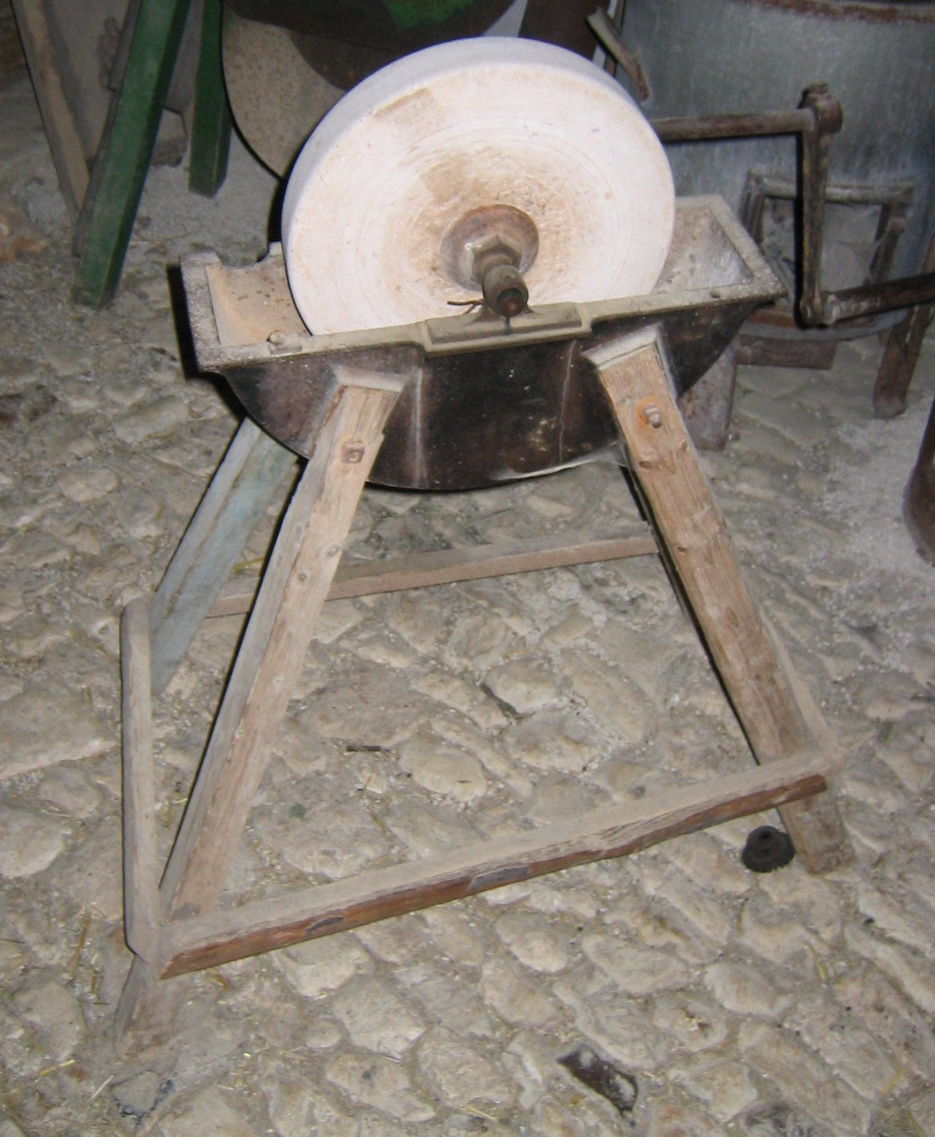 Nassschleifer mit Schleifstein im Freilichtmuseum Neuhausen ob Eck